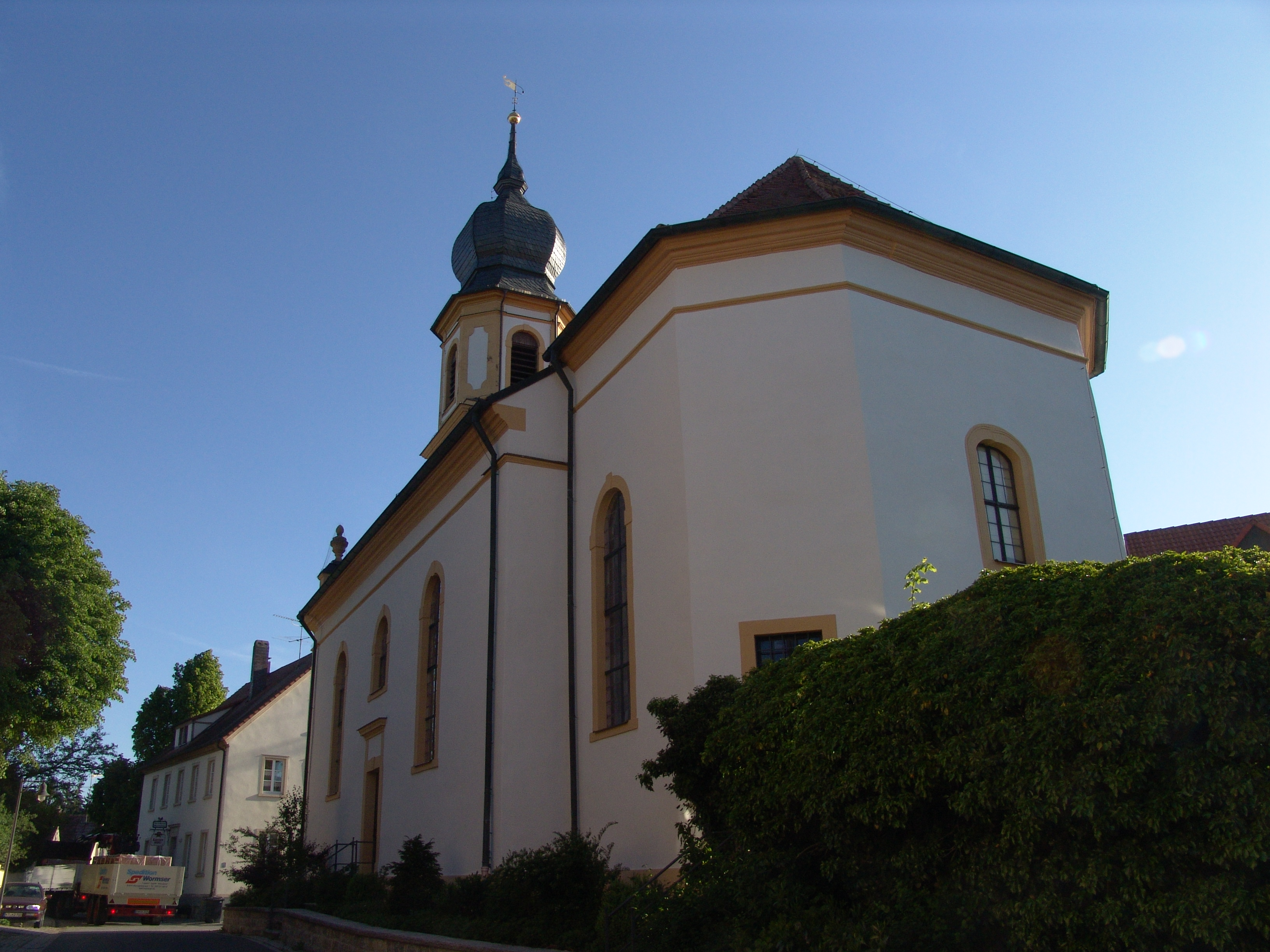 evang.-luth. Kirche St. Andreas in Schernau